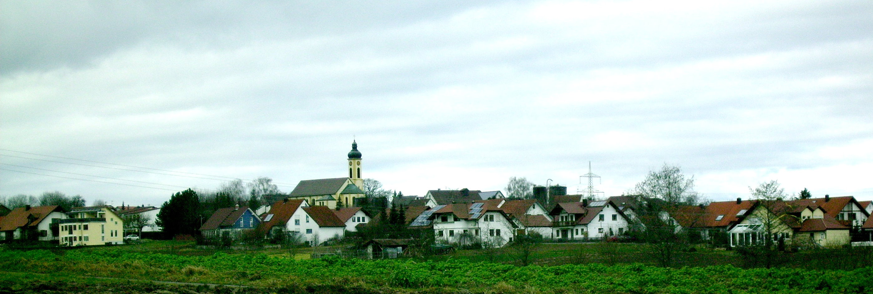 Description